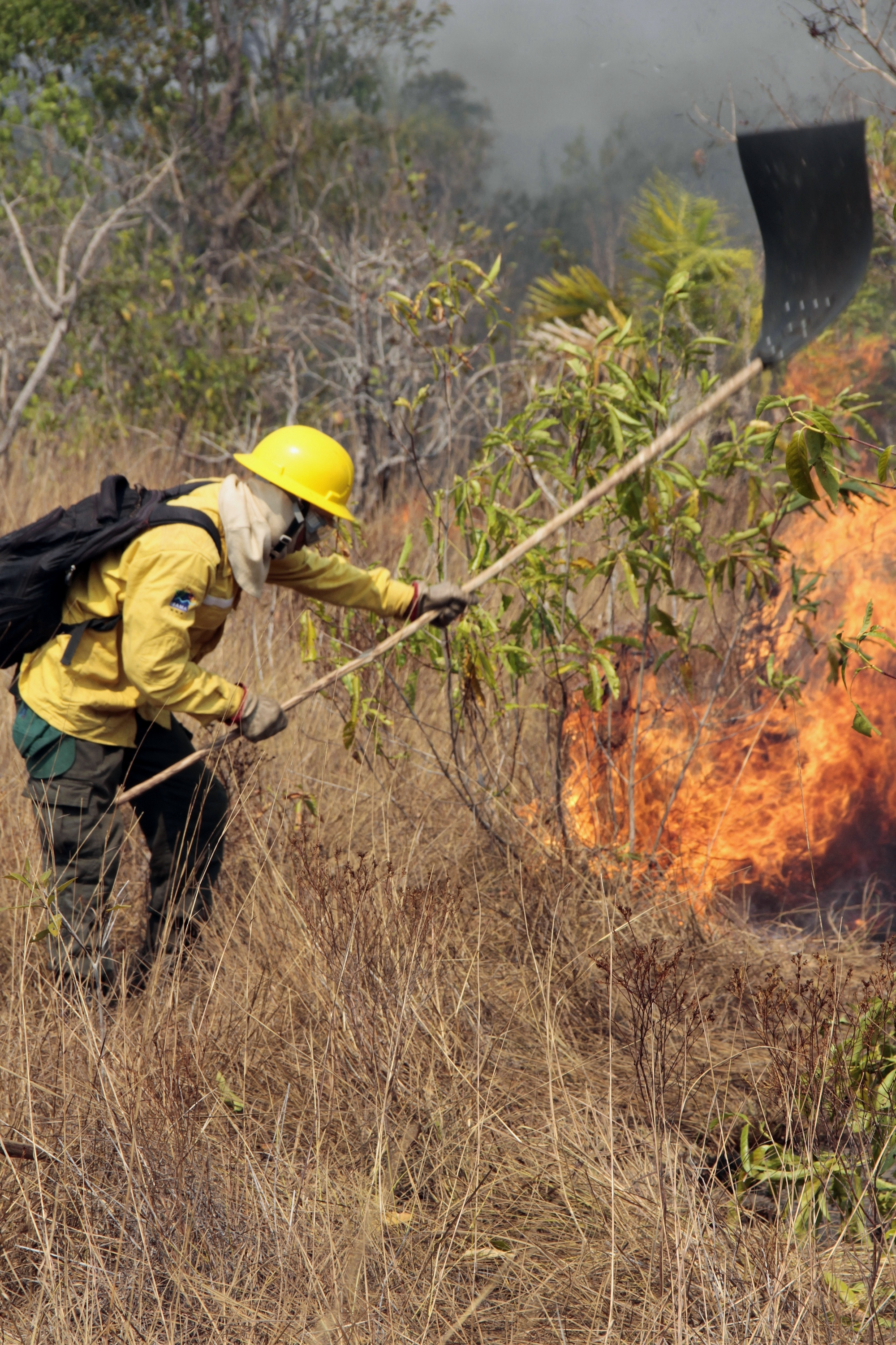 Prevfogo/Ibama combate incêndio florestal no Parque Indígena do Xingu, no Mato Grosso. Foto: Vinícius Mendonça - Ascom/Ibama